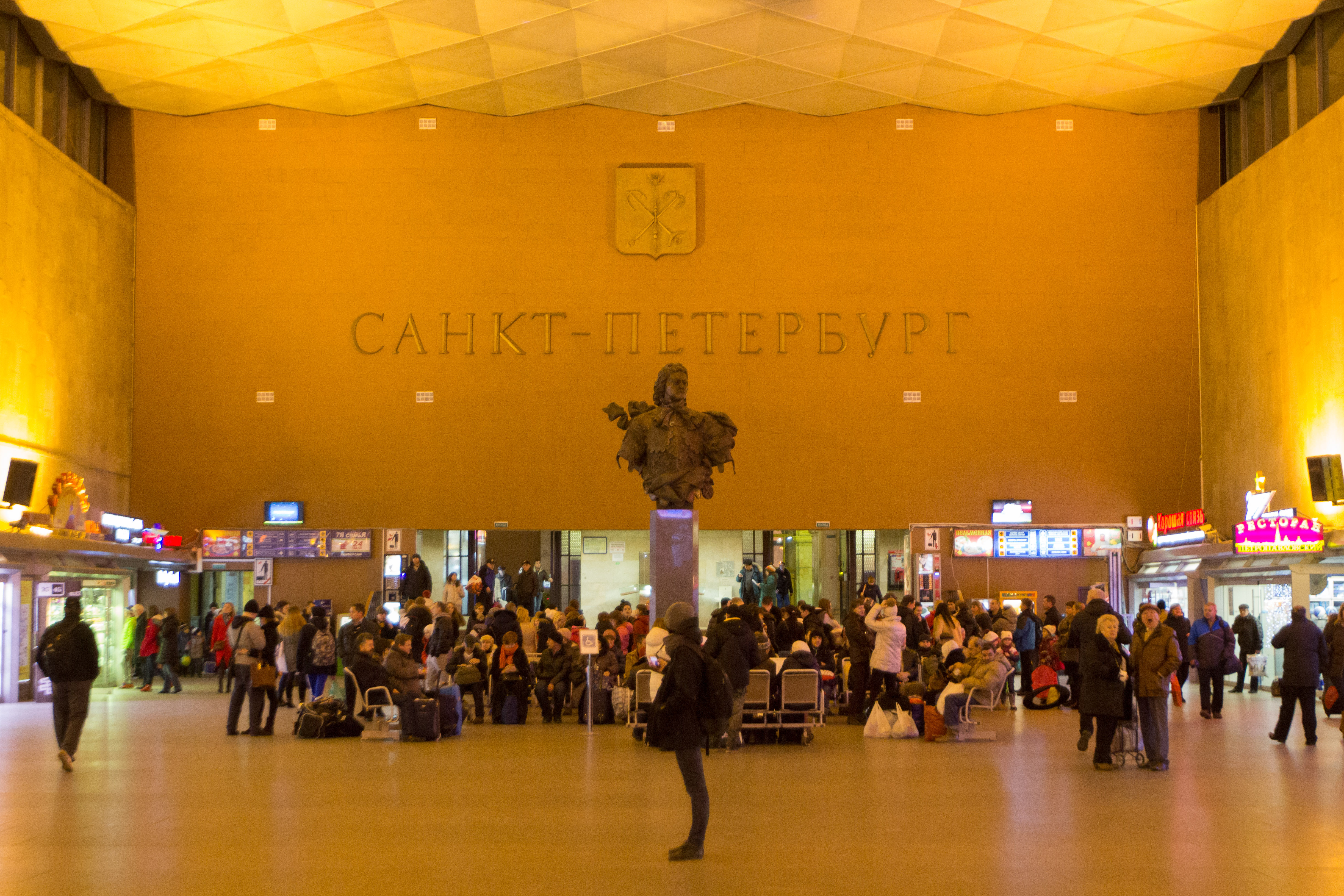 Vue du hall de la gare de Moscou à Saint-Pétersbourg (Russie)